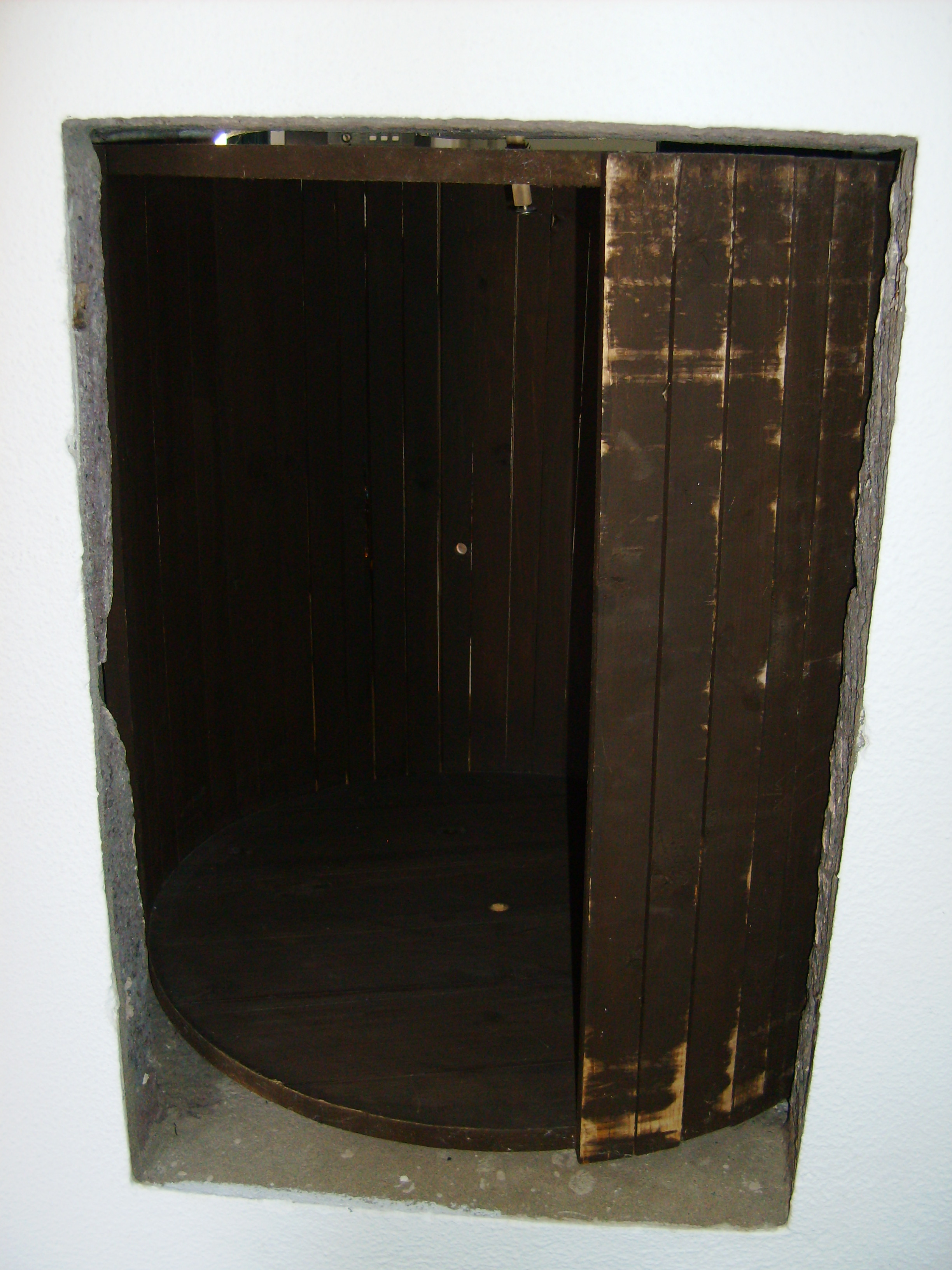 Roda dos Expostos. Recohimento de Santa Maria Madalena, freguesia e concelho da Vila do Porto, ilha de Santa Maria, Açores.